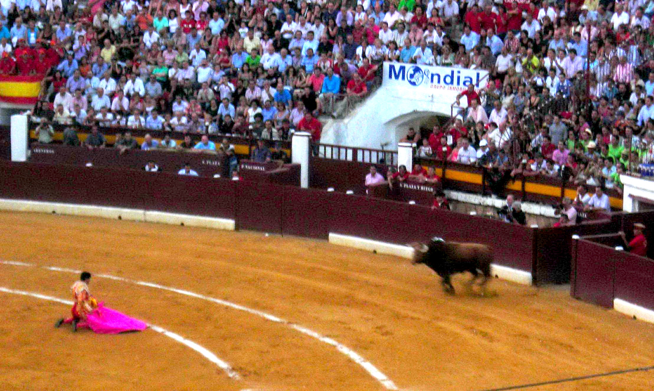 Pepín Liria recibiendo a porta gayola al segundo toro de su lote durante la corrida del 15 de septiembre de 2007 en la Feria de Murcia. Durante la faena con la muleta sería corneado por el mismo.